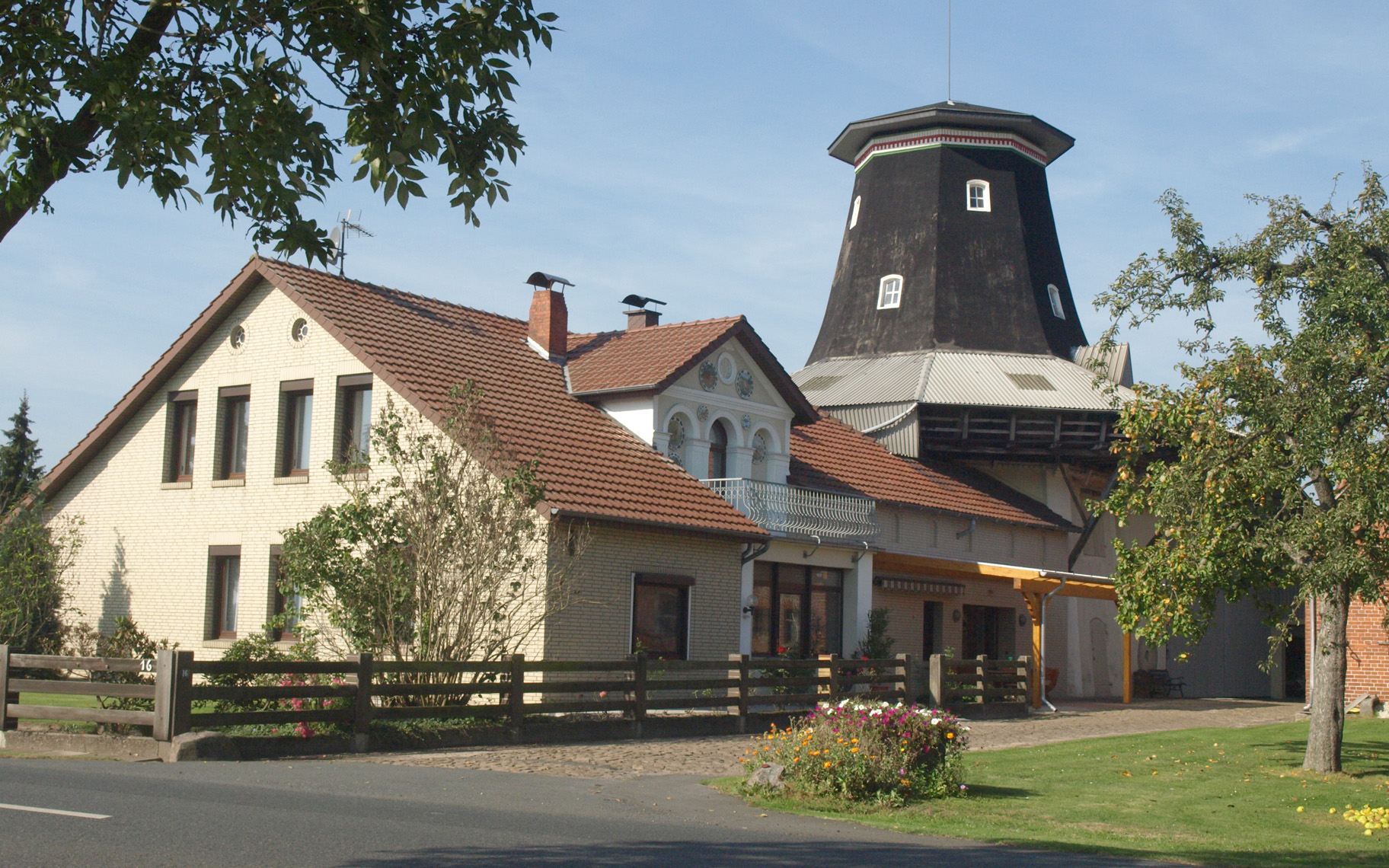 Blender Einste (Niedersachsen), Mühlenstumpf, Foto: 2011